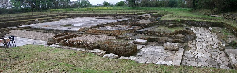 Fouilles Suessola province de Naples